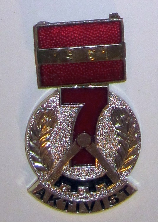 Aktivistenabzeichen Siebenjahrplan 1961